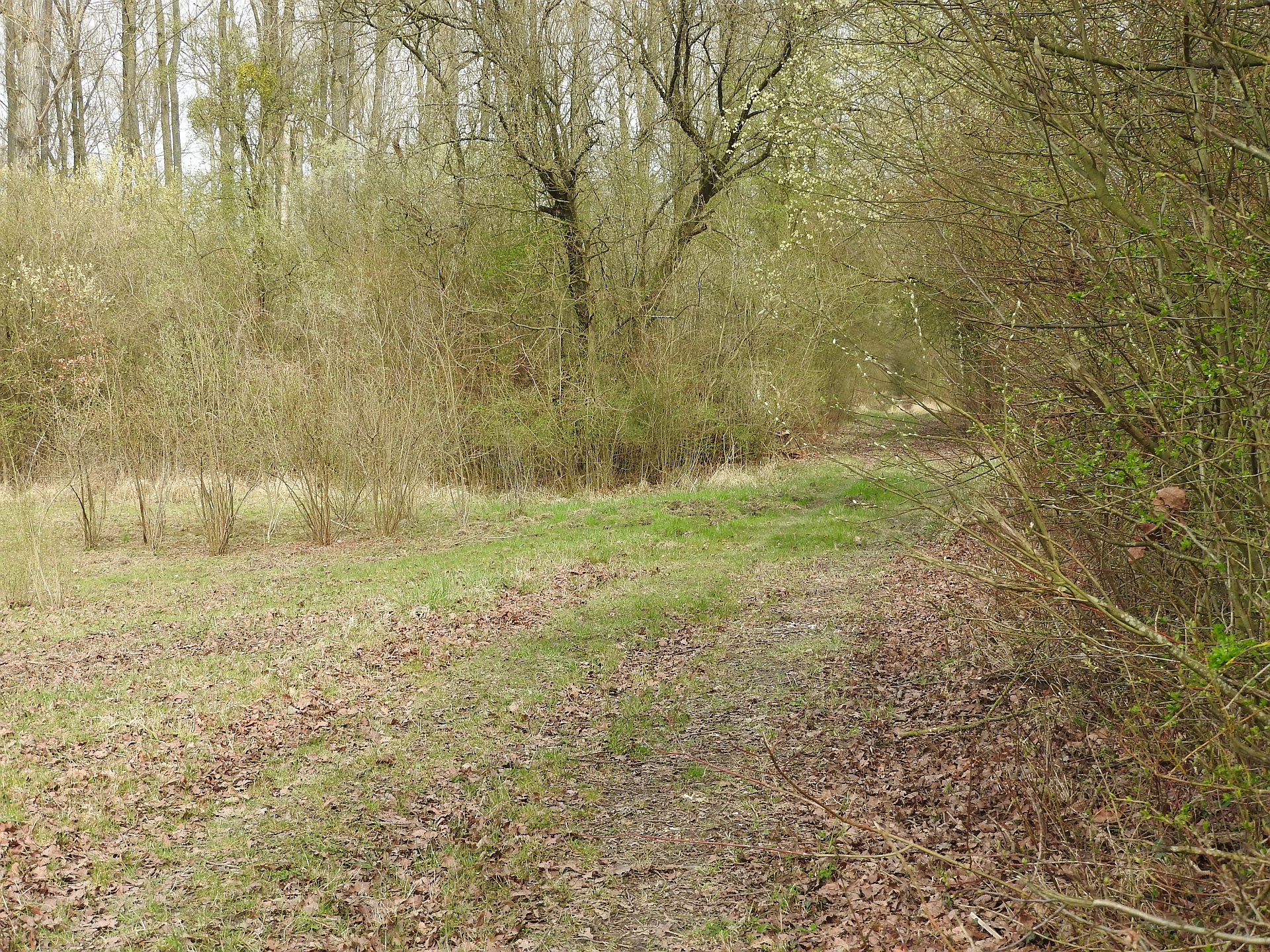 Naturschutzgebiet Im Willig bei Germersheim/Sondernheim, 3.04.2016